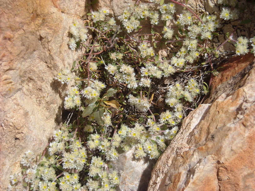 Flore de Douar Tagzen Flore de Douar Tagzen